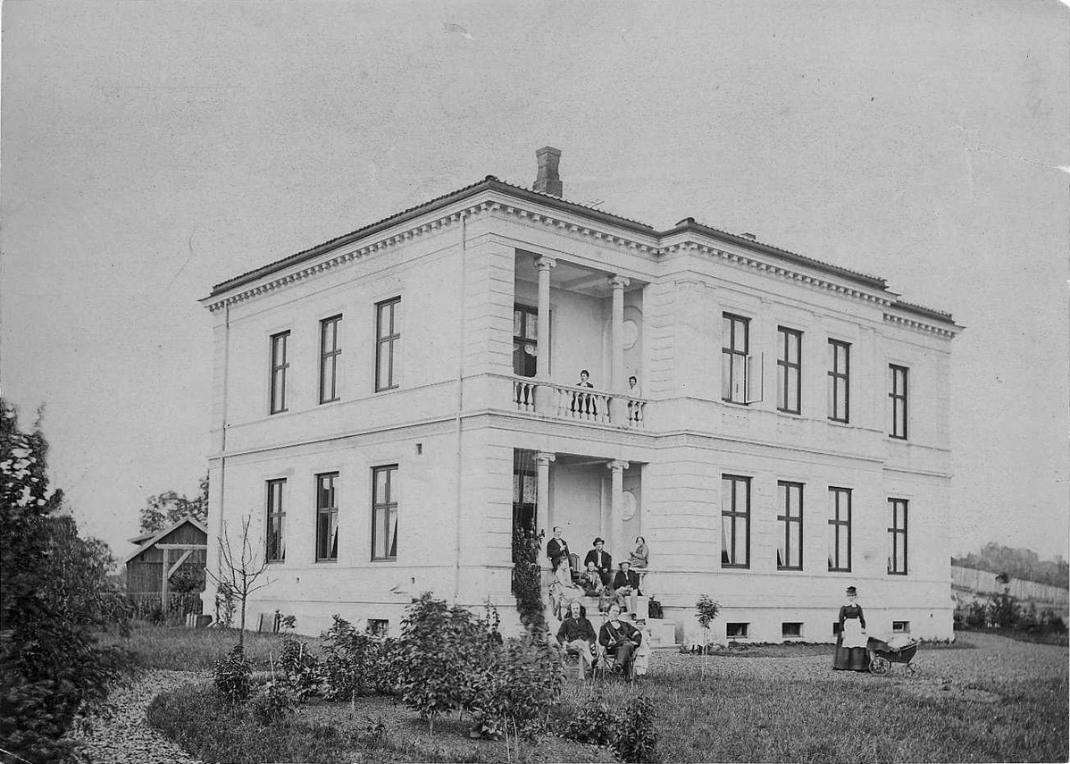 Villa Holter, Colbjørnsens gate 5, ca. 1870. Solgt til den svenske stat i 1906, og er Sveriges ambassadørbolig. Fasaden endret rundt 1906.